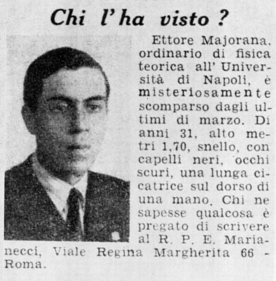 Annonce de la disparition de Majorana publiée en 1938 dans l’hebdomadaire italien Domenica del Corriere.